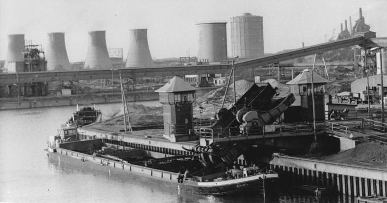 Eisenhüttenstadt, Binnenhafen, Waggonkippanlage Zentralbild Reiche 17.11.70 Bez.Frankfurt-Binnenhafen Eisenhüttenstadt- zweitgrößter Binnenhafen der DDR. Bei einer Tagesleistung von 9000 Tonnen werden hauptsächlich Kohle, Baustoffe, Erze und Stückgüter aus Polen, und der UdSSR für die DDR und für den Transitverkehr umgeschlagen. Auf der Waggonkippanlage (u.B.) werden täglich 300 Waggons über das Anschlußgleis der Reichsbahn bewegt.